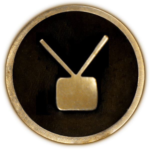 Symbol der Kategorie Fernsehen (television) der Sterne auf dem Hollywood Walk of Fame.